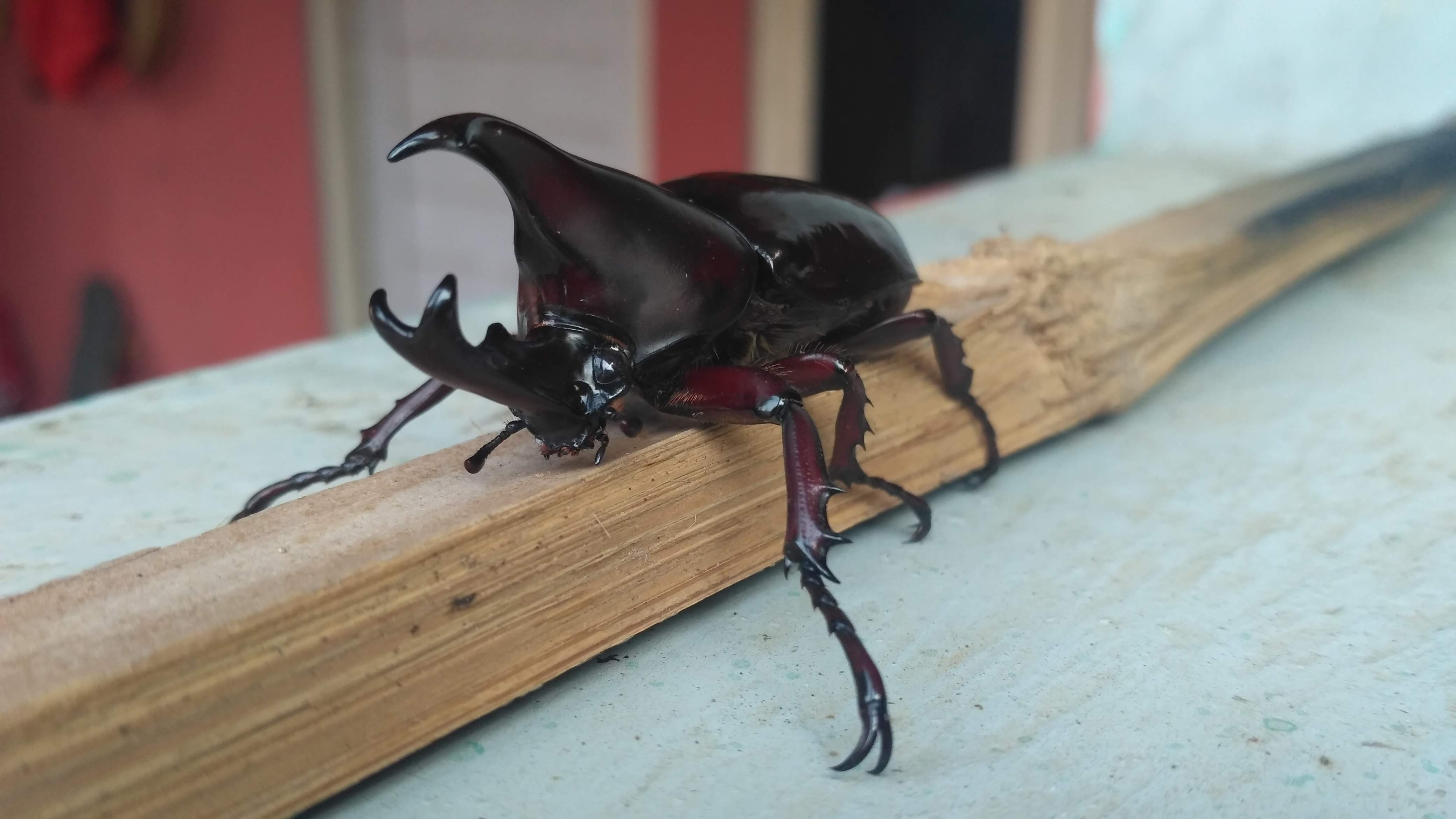 Kumbang Badak Jepang